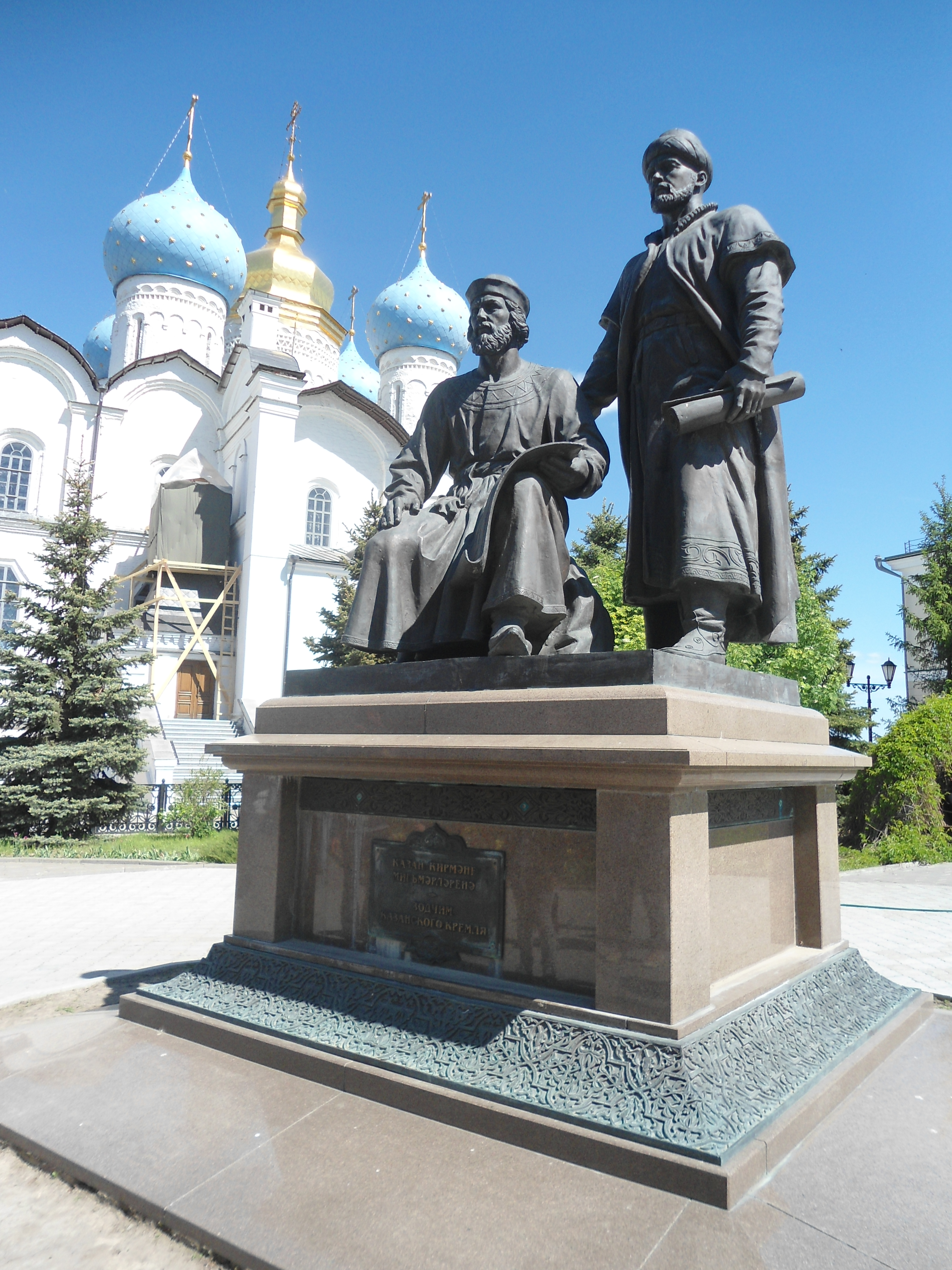 Kazan monument